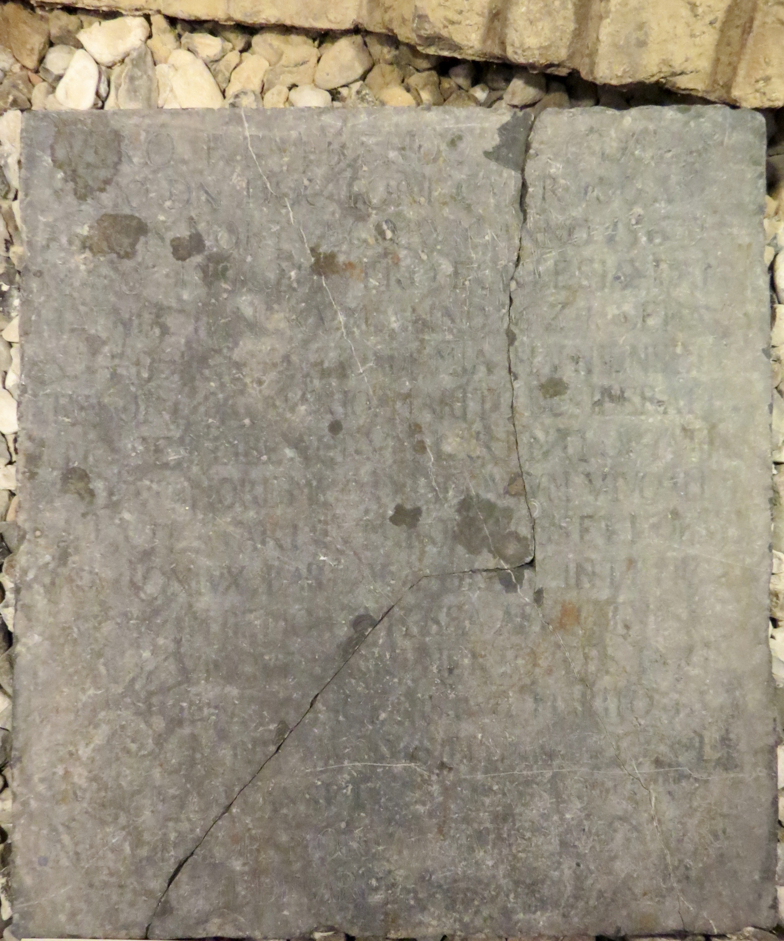 Gravsten over professor Cort Aslaksen (1569-1624) bekostet af hans hustru Barbara Olufsdatter og hendes to overlvende børn. Fra Vor Frue Kirke i Københavns museum.